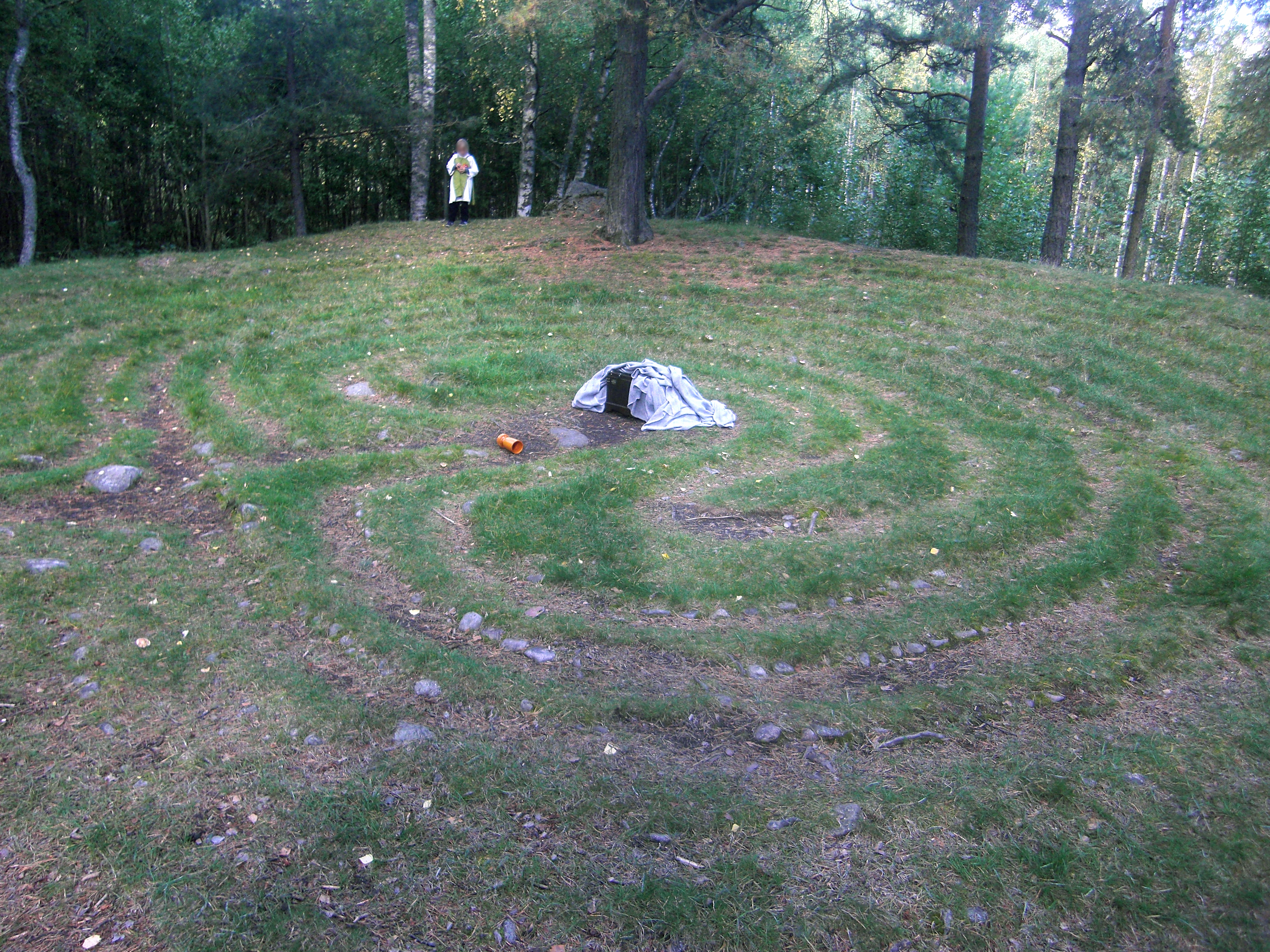 Labyrinten i Tibble (Raä-nr Västerås 434:1) strax öster om Västerås, Västmanland, Sverige. Föremålen i labyrinten beror på att Badelunda hembygdsförening just hållt ett skådespel där.